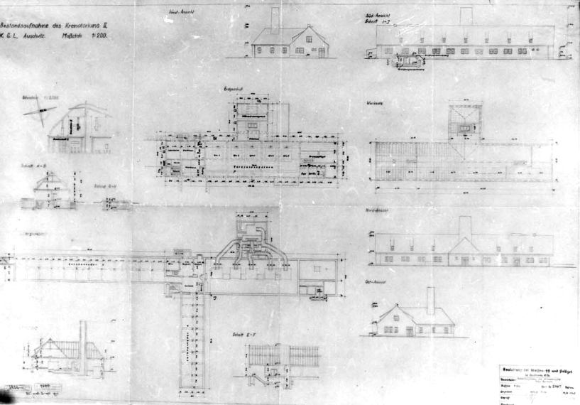 Krematorium II Auschwitz-konstr-plan